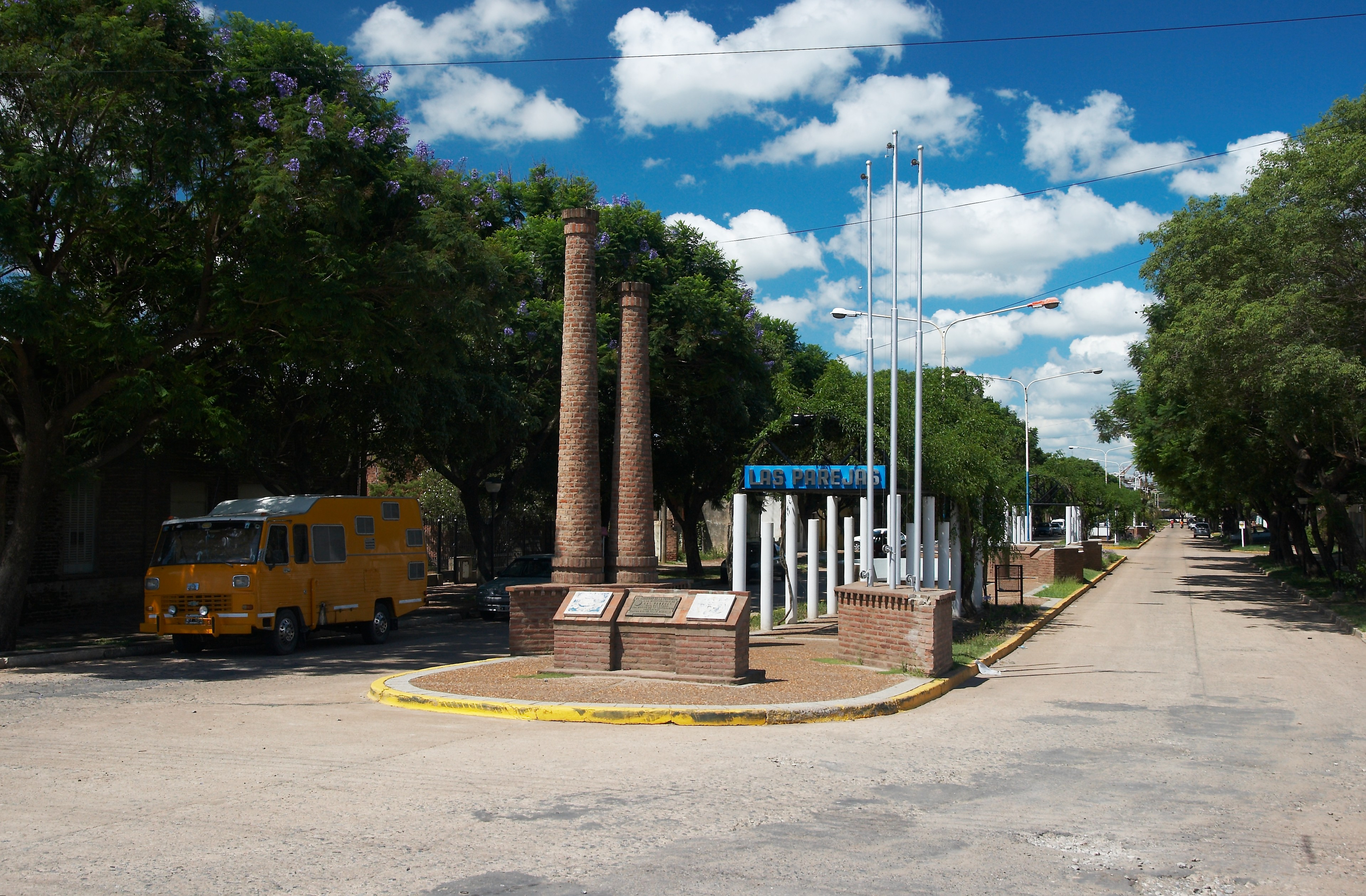 Entrada sobre Ruta Nacional 178, Las Parejas, provincia de Santa Fe, Argentina.